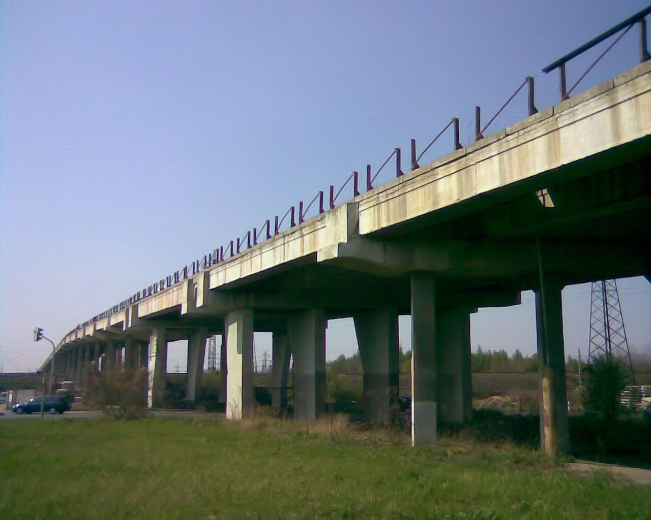 Pasovka v Bílině